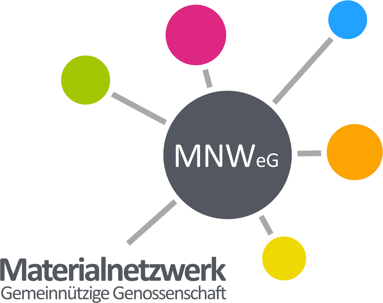 ASW Alemannenschule Wutöschingen. Gemeinschaftsschule mit integrierter gymnasialer Oberstufe in der Gemeinde Wutöschingen im Landkreis Waldshut in Baden-Württemberg.